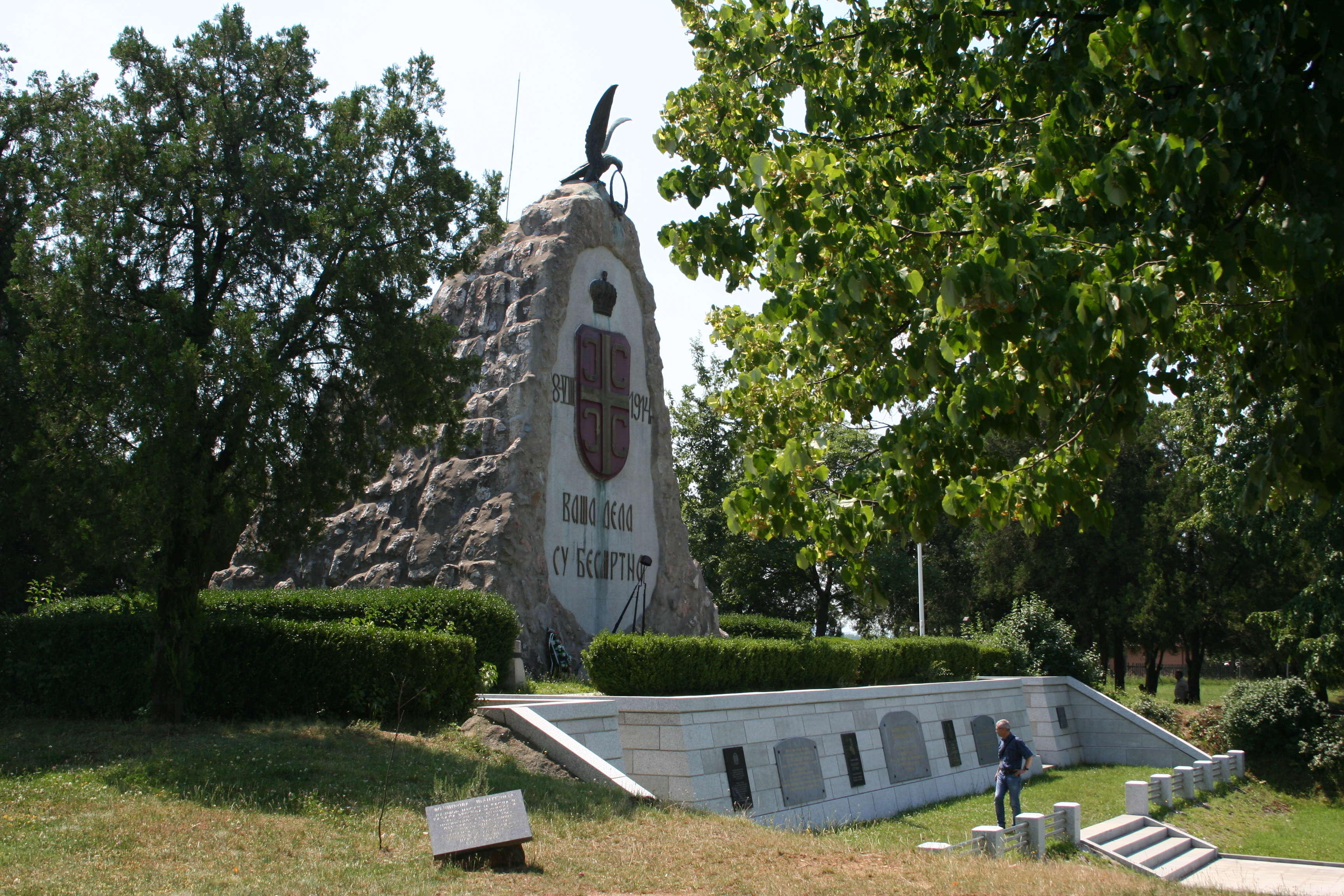 Spomen-kosturnica na Ceru